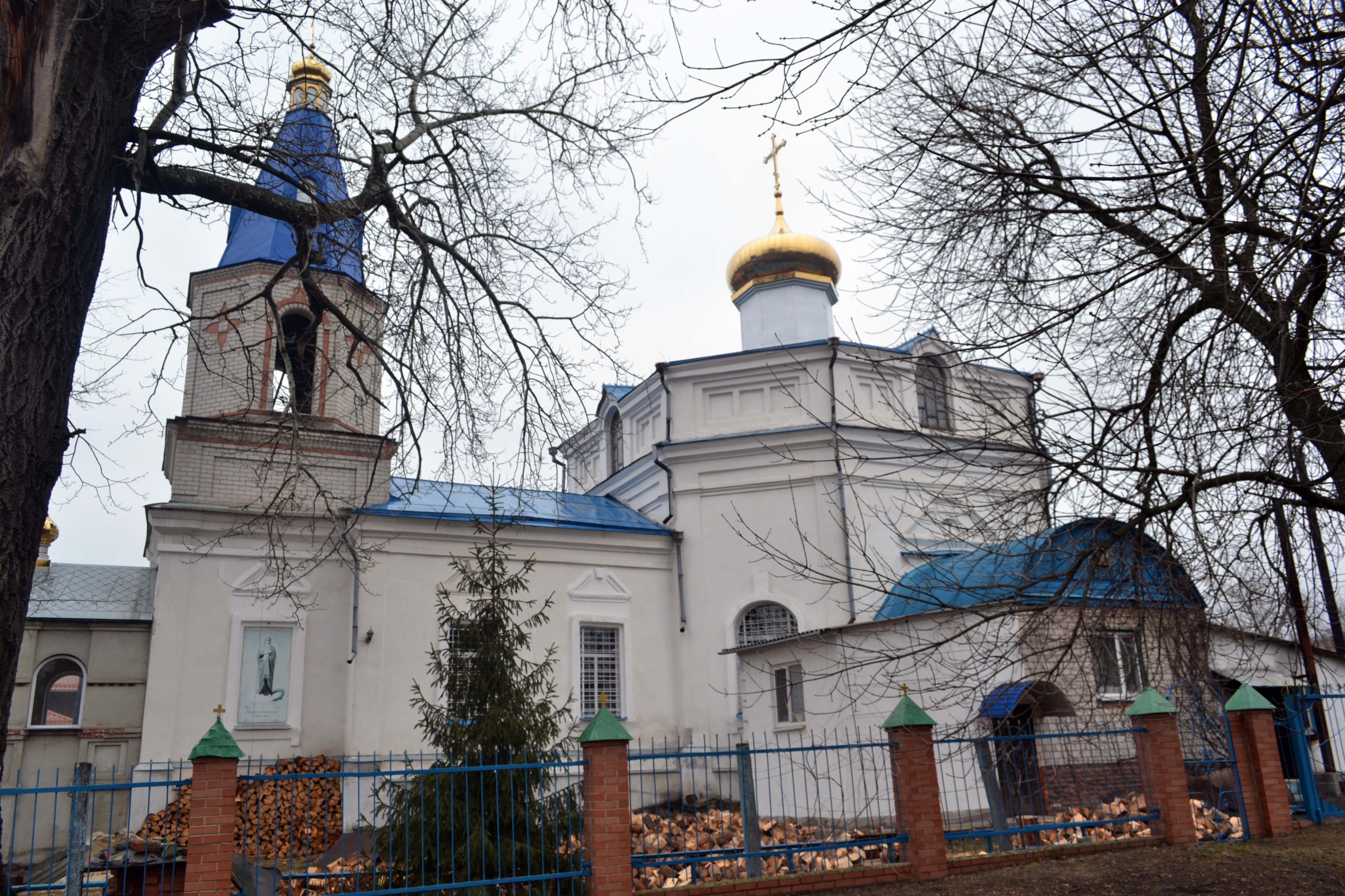 Храм села Торське. Донецька область